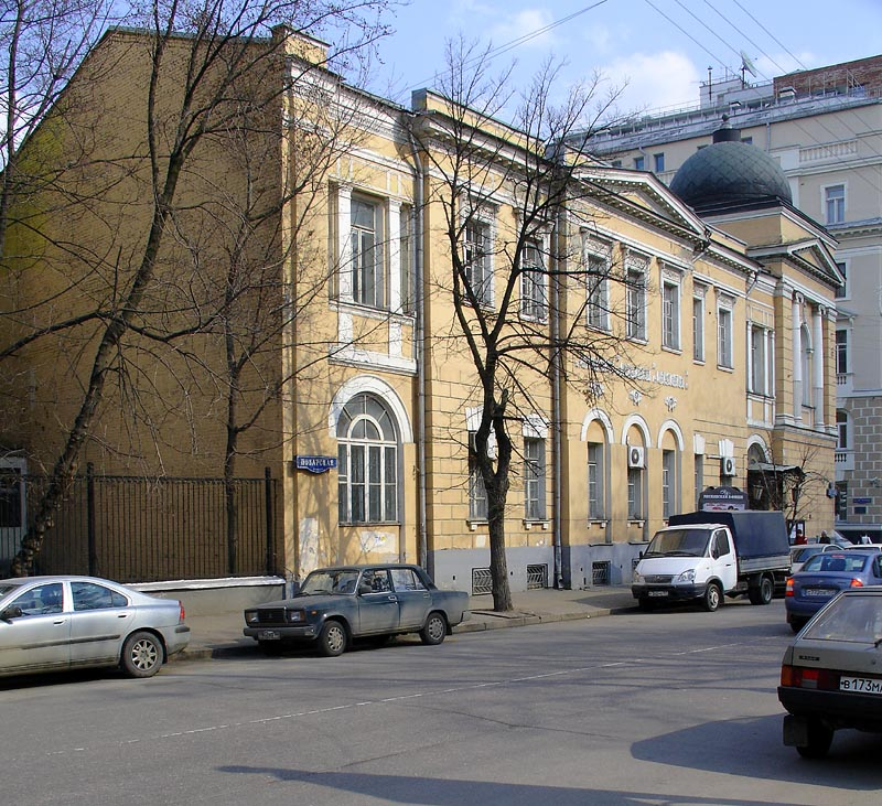 Moscow, Povarskaya, 30, by Alexander Kaminsky